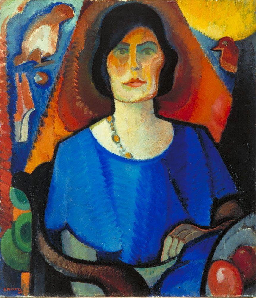 Self-portrait